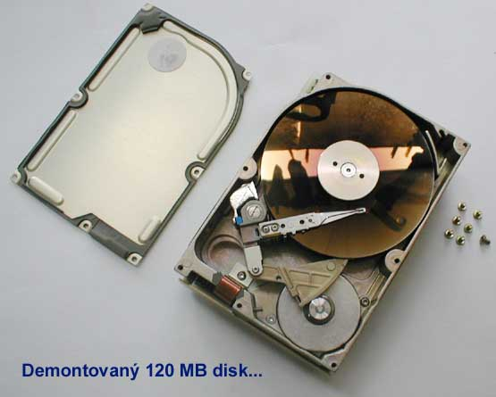 Fotografie starého HDD